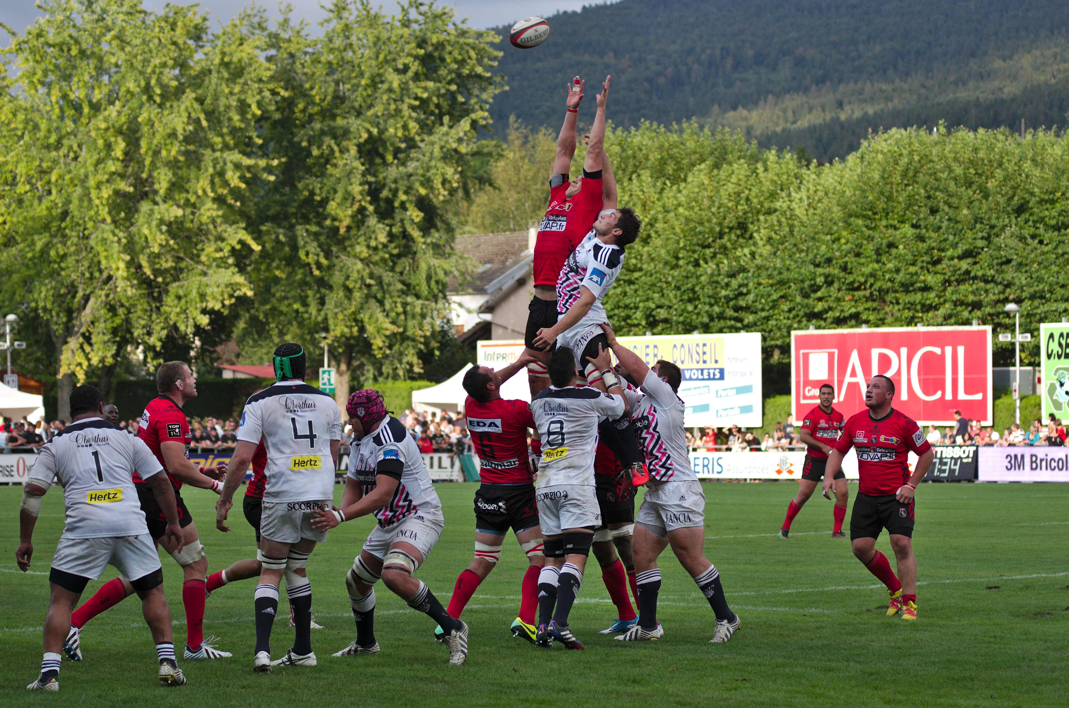 USO-SFP - 20140830